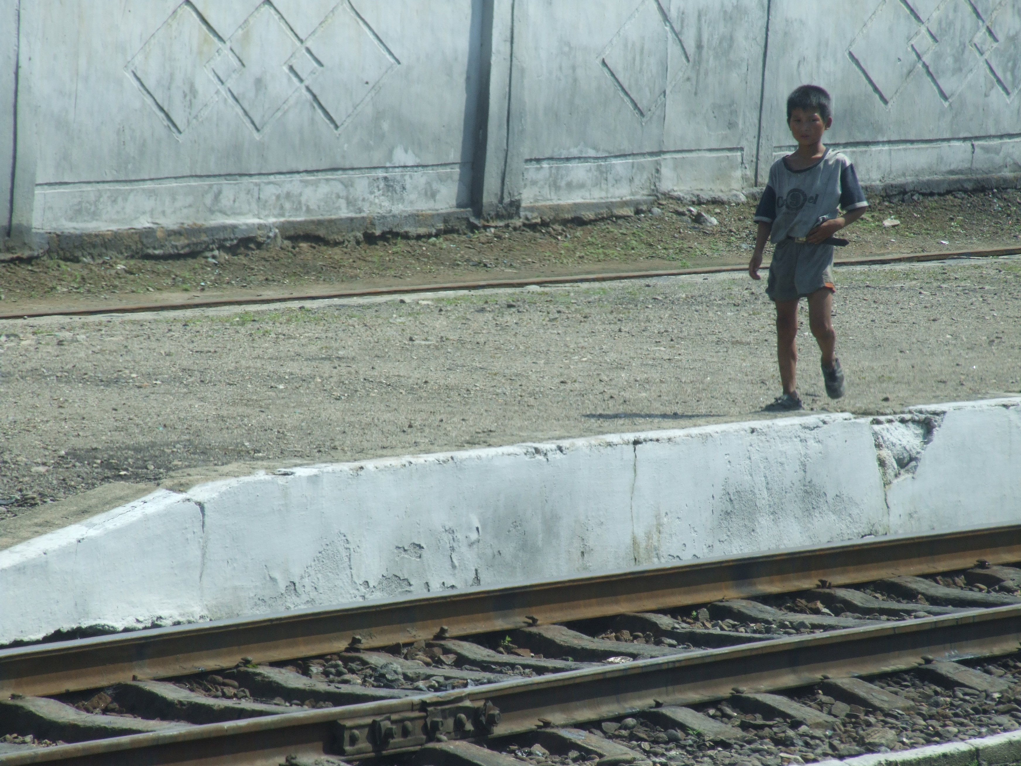 Bahnhofsszene in Nordkorea